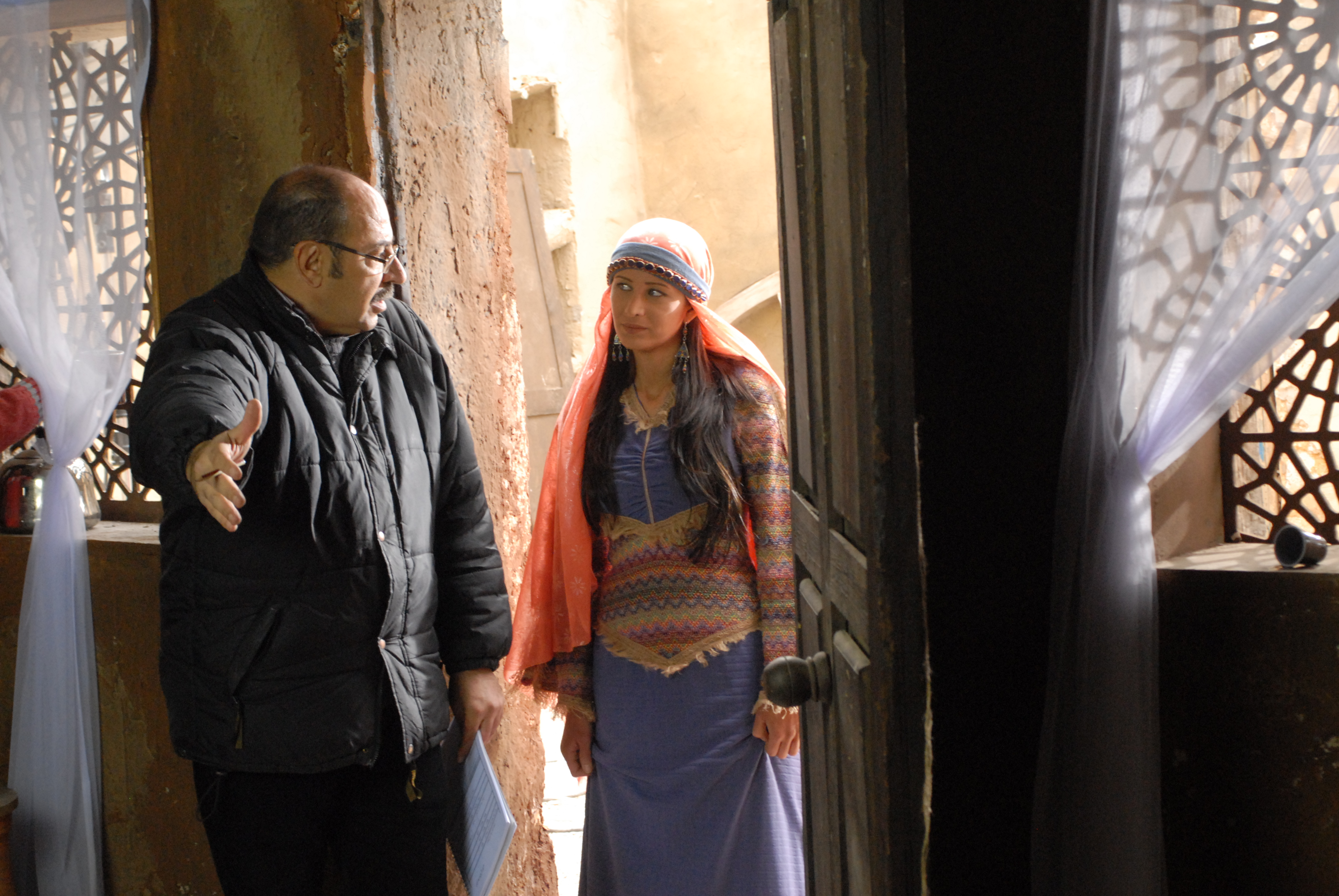 اخراج تلفزيوني